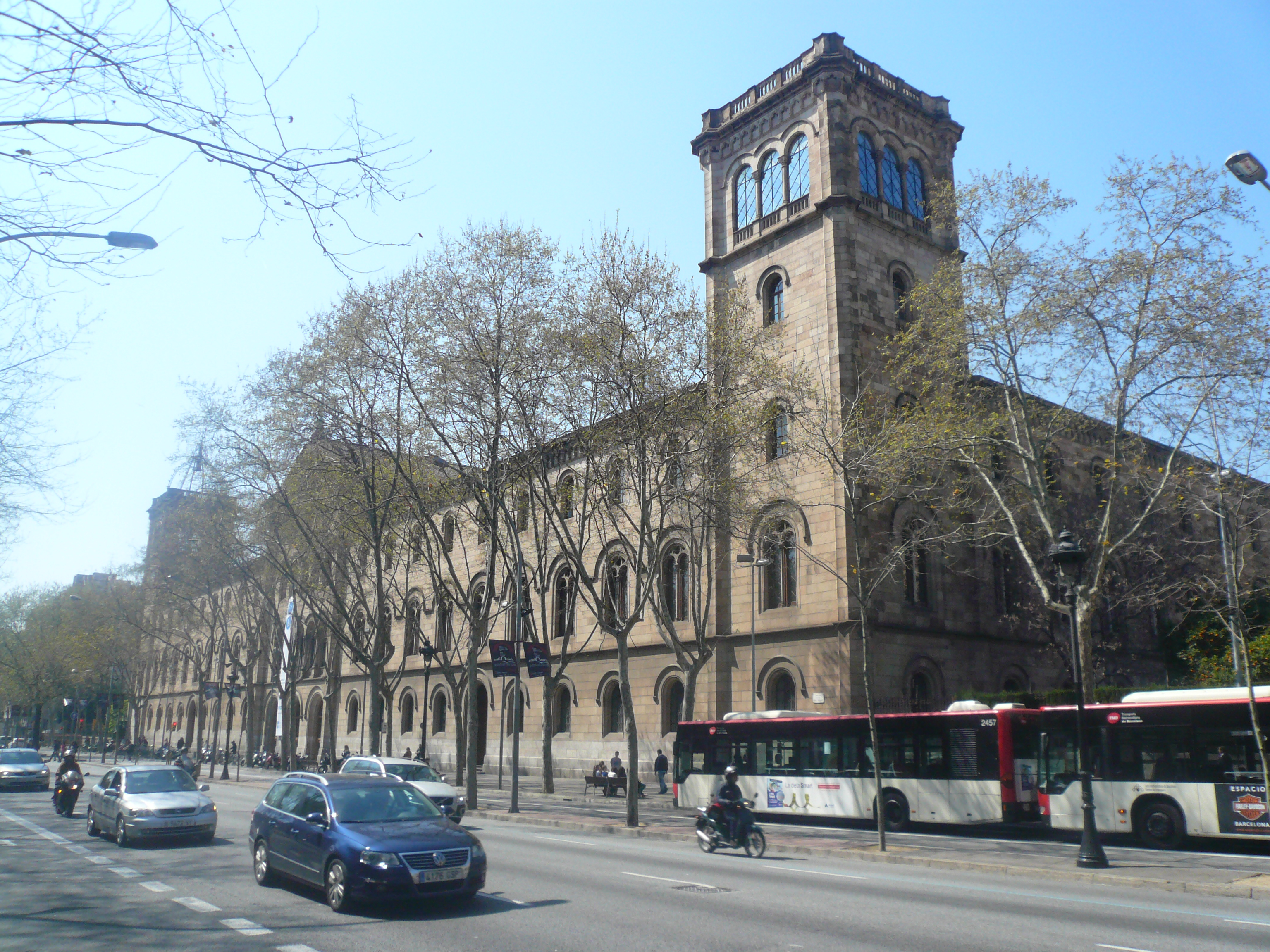 Edifici de la Universitat. Gran Via de les Corts Catalanes, 585 (Barcelona). Object location41° 23′ 11.76″ N, 2° 09′ 50.03″ E